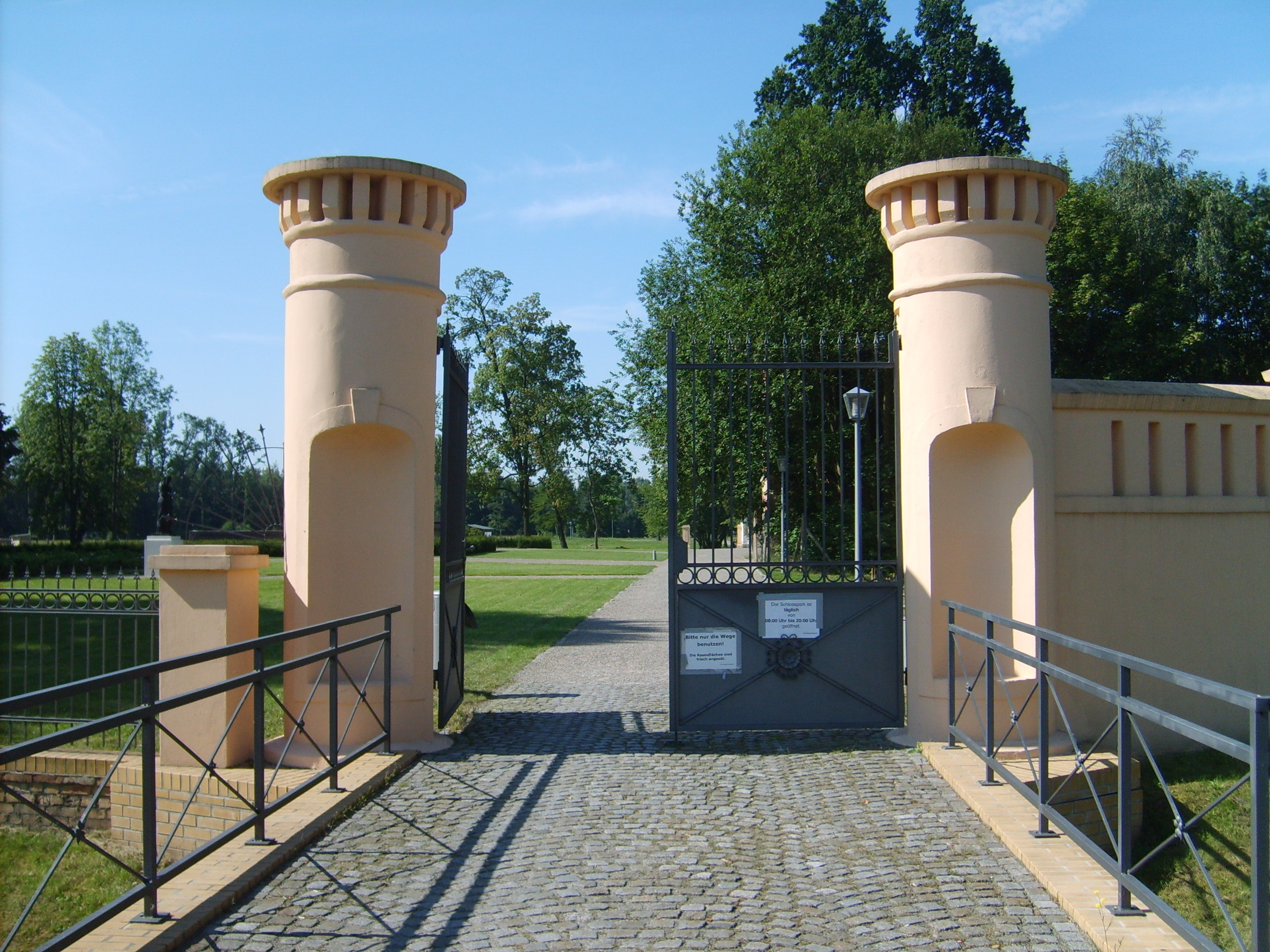 Eingang zum Schlosspark Lauchhammer-west